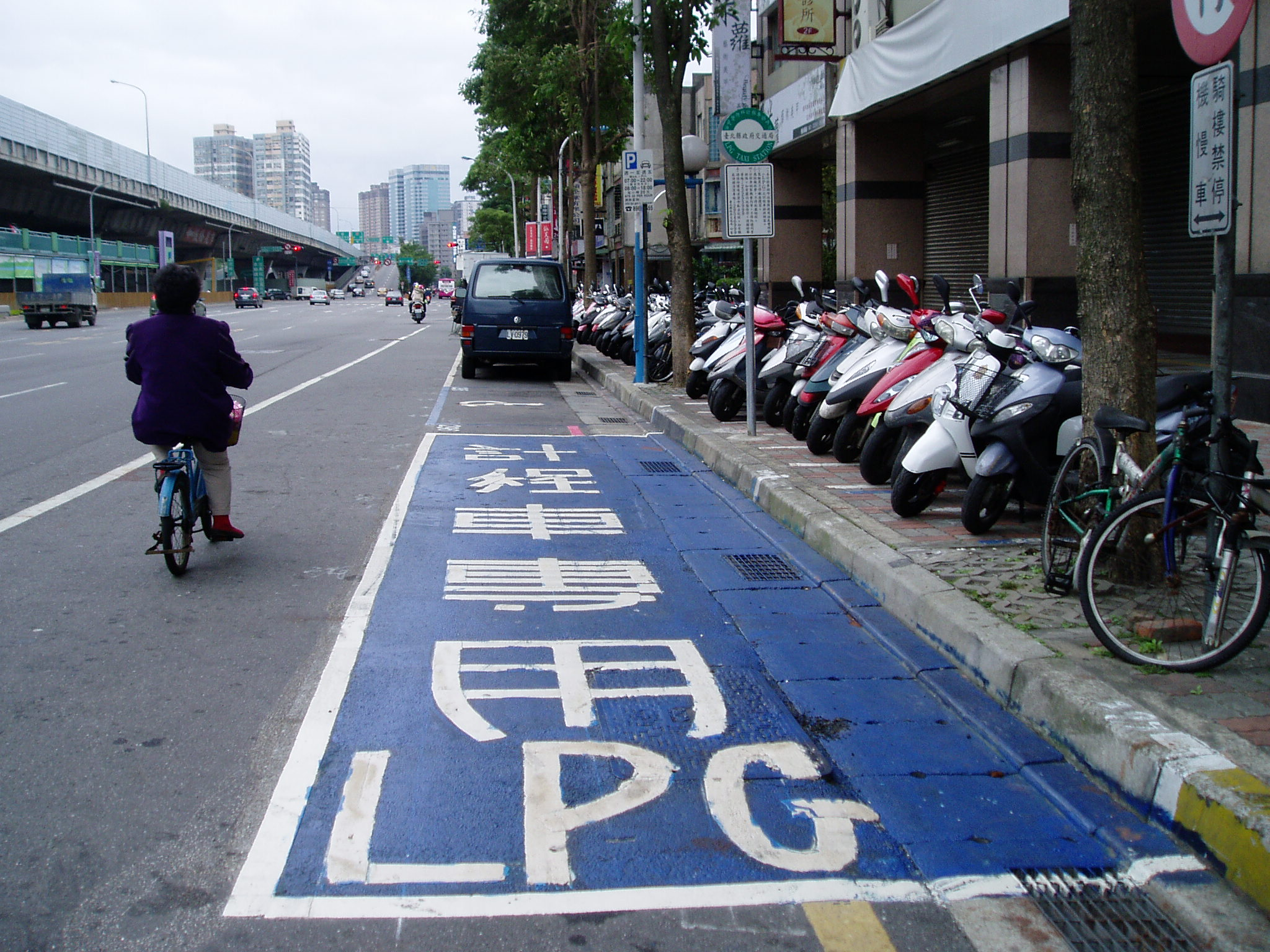 中文（台灣）: 臺北縣板橋市民生路二段，臺北縣政府交通局劃設的LPG計程車專用停車格。